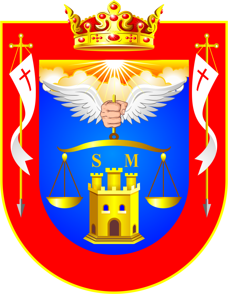 La forma del escudo es cuadrilonga, con la parte inferior redondeada, guardando las dimensiones de seis de alto por cinco de ancho. Las nubes y los rayos de fuego que deben estar en lo alto y a todo lo ancho de lo que se llama el Jefe del escudo, son un tanto difícil de interpretar, pero debe anotarse que los rayos son de fuego, no de tempestades eléctricas, como podría suponerse. Con esto, se simboliza que la Divina Providencia, desde lo alto, protege a la ciudad. Continúa la Cédula diciendo: "que tenga un peso con su balanza todo de oro". Al margen va dibujado el escudo, donde se aprecia que el peso está sostenido por una mano con alas en el corazón del escudo, claramente simboliza el Arcángel San Miguel. En la Edad Media se tenía al Arcángel como un guardián a las puertas de la Gloria y su deber era pesar las almas de los difuntos que llegaban, para ver si sus actos buenos pesaban más que los malos y determinar si eran merecedores de entrar o no, en el Paraíso Celestial. Por este motivo es que en aquella época encontramos que se representaba al Arcángel con una balanza en una mano, de ahí la alegoría del escudo de San Miguel. "Entremedios de dicho peso un Castillo de oro", y dos letras también de oro que dicen San Miguel. Este castillo representa a la ciudad, con sus puertas y dos ventanas en azul, que debe estar entre las dos pesas. El castillo se pinta cuadrado, con al menos tres torres, una puerta y dos ventanas, lo que concuerda a cada lado hay unas cruces, con dos banderas revueltas en unas varas de lanzas con un hierro de oro y las banderas con una cruz colorada. Estas insignias representan la fe cristiana que trajeron a estas tierras.